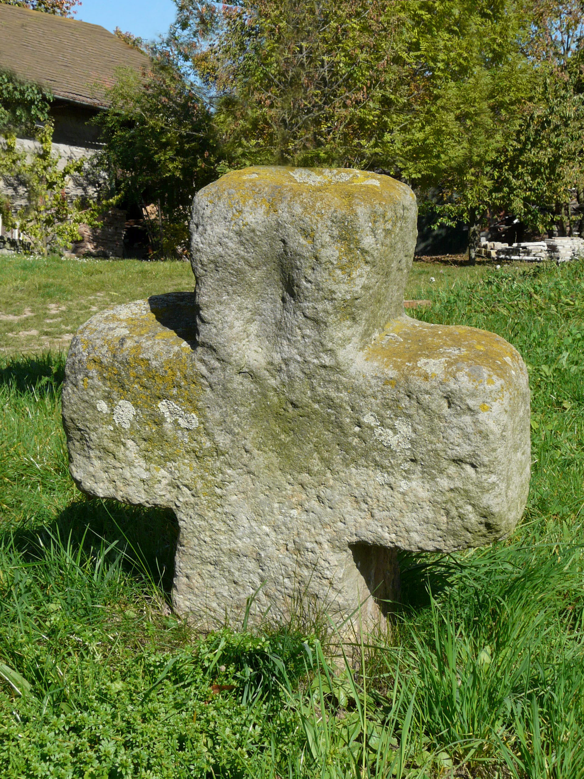 Smírčí kříž (Hustířany), u silnice před domem čp.4, Hustířany